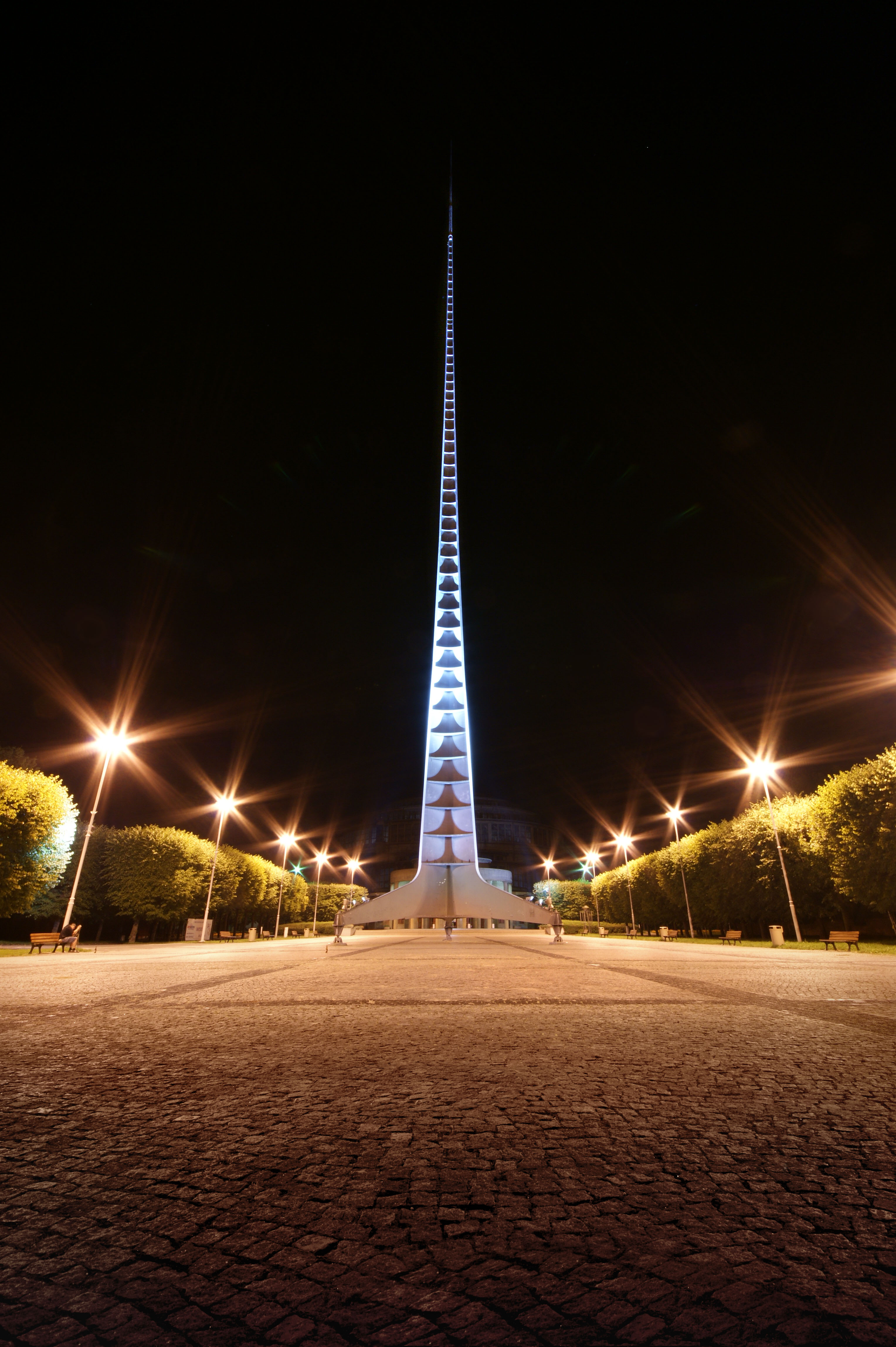 Iglica przed Halą Stulecia we Wrocławiu.